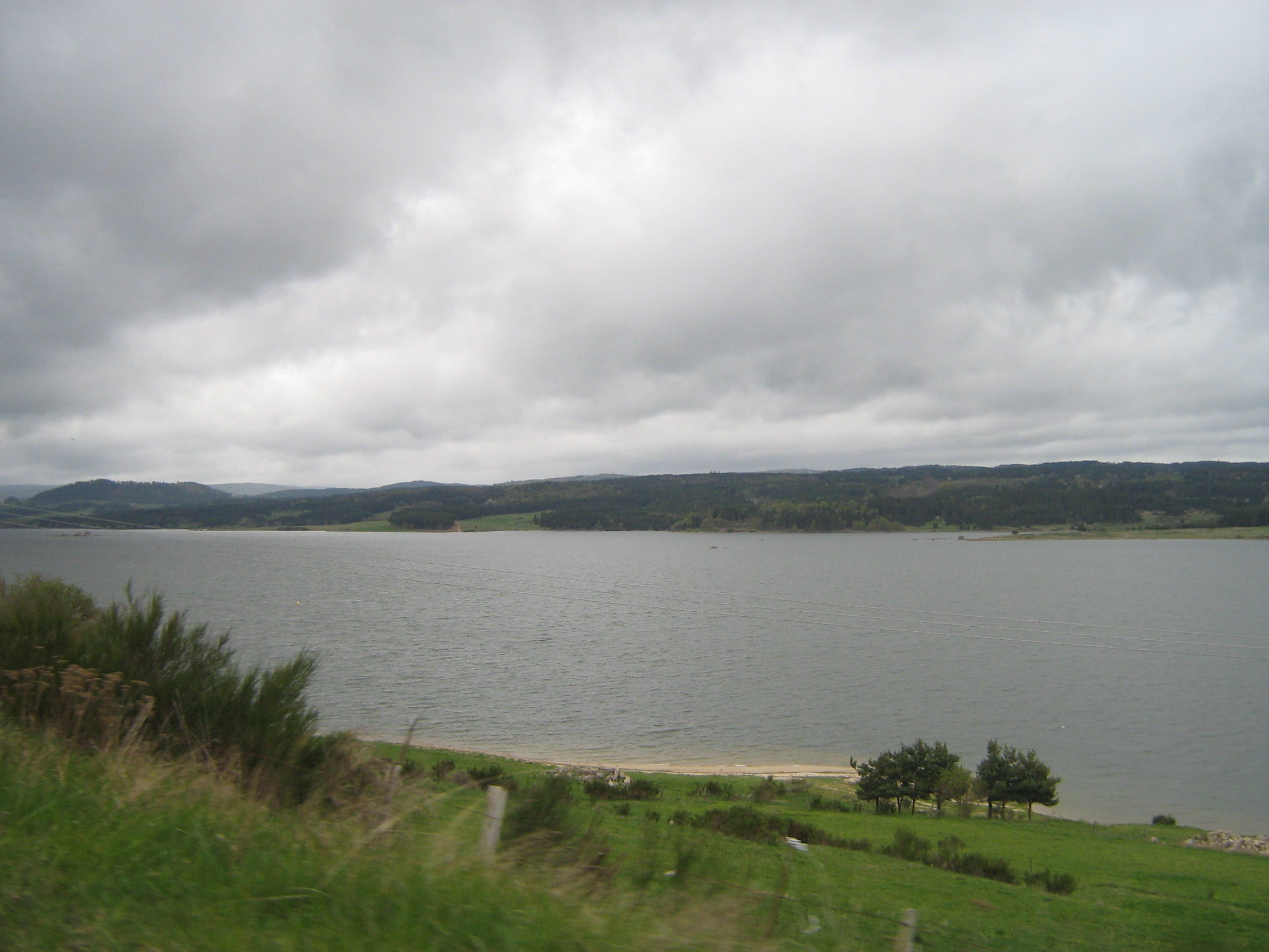 Lac artificiel de Naussac (Lozère)